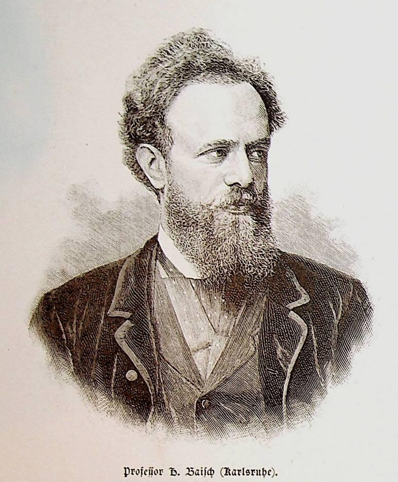 Porträt Professor Hermann Baisch, 1885